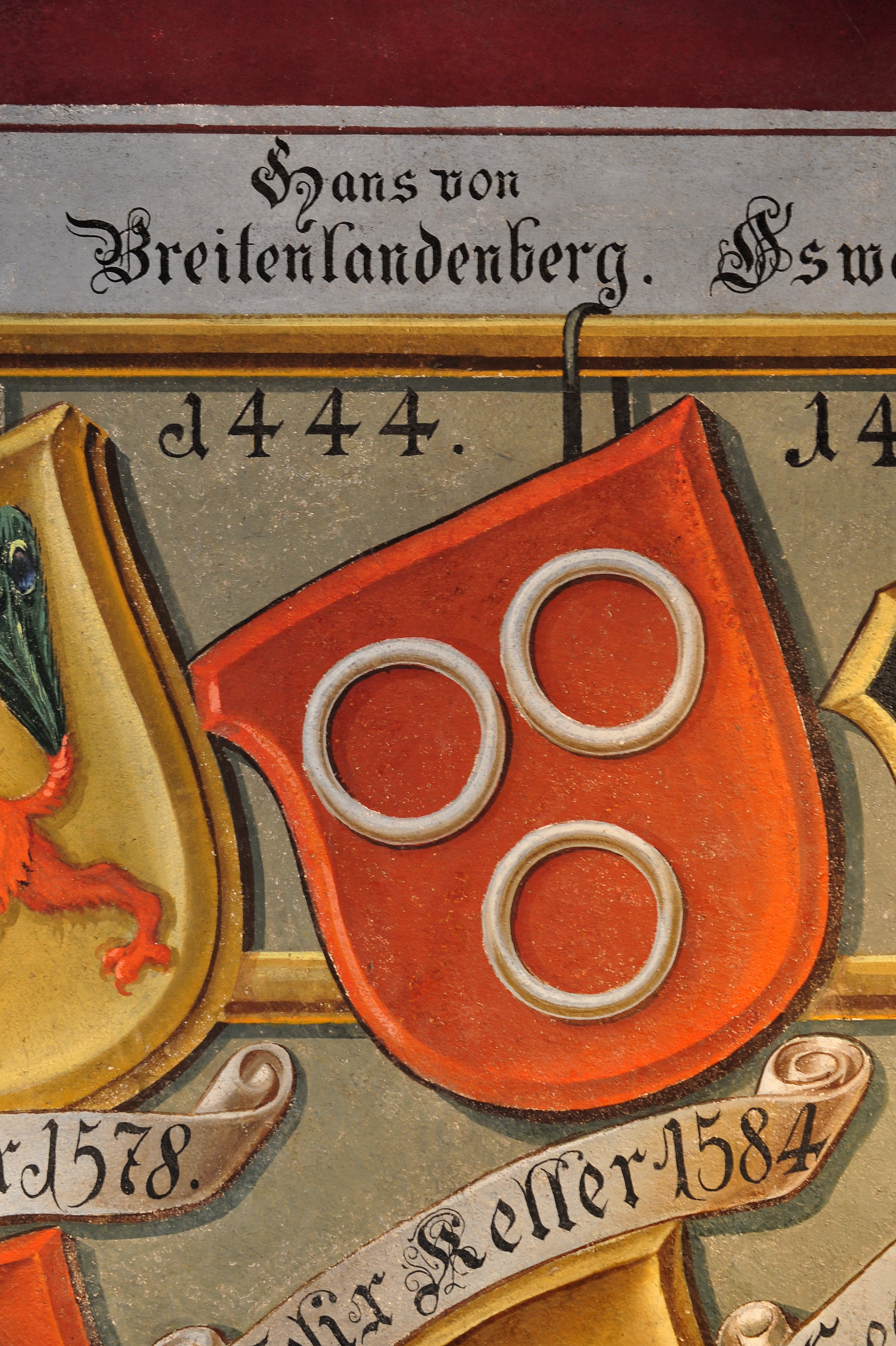 Schloss in Greifensee (Switzerland)